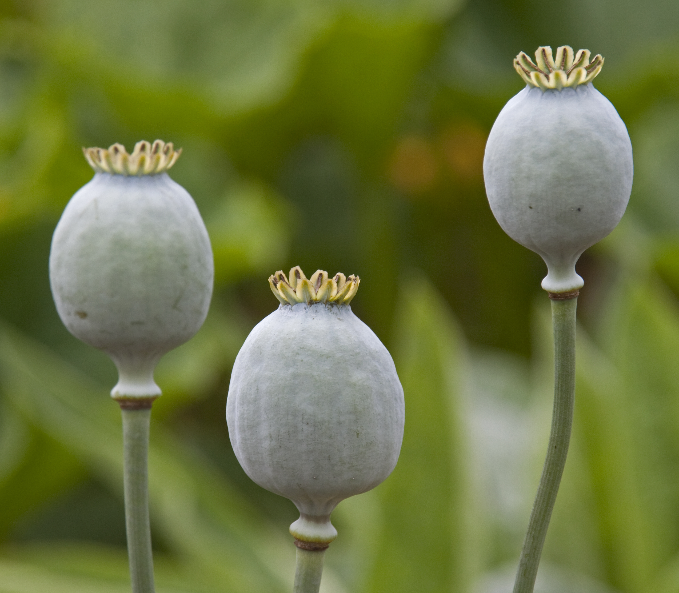 Poppy seed heads